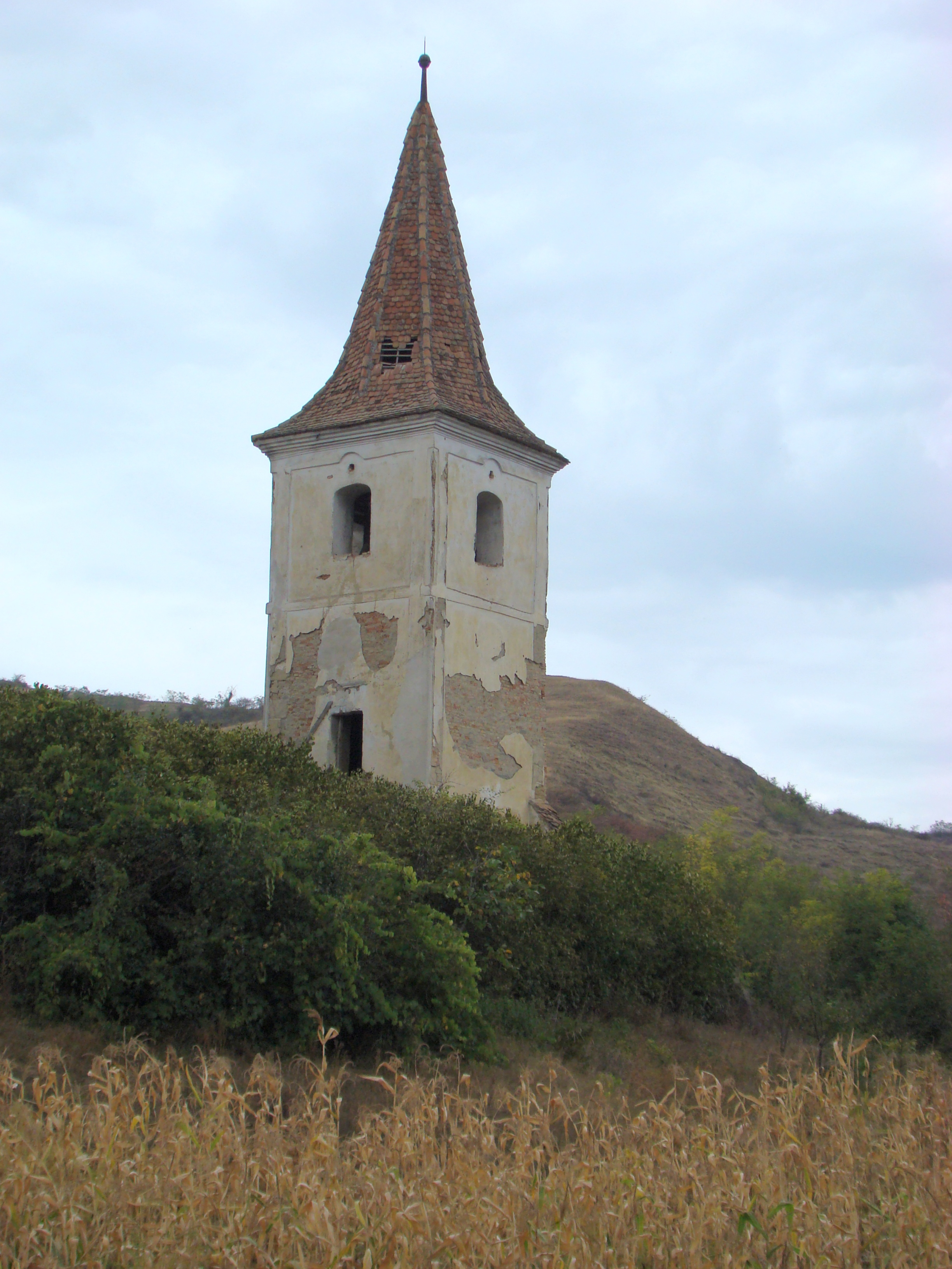 Turnul bisericii evanghelice, sat Veseuș; comuna Jidvei, județul Alba 02